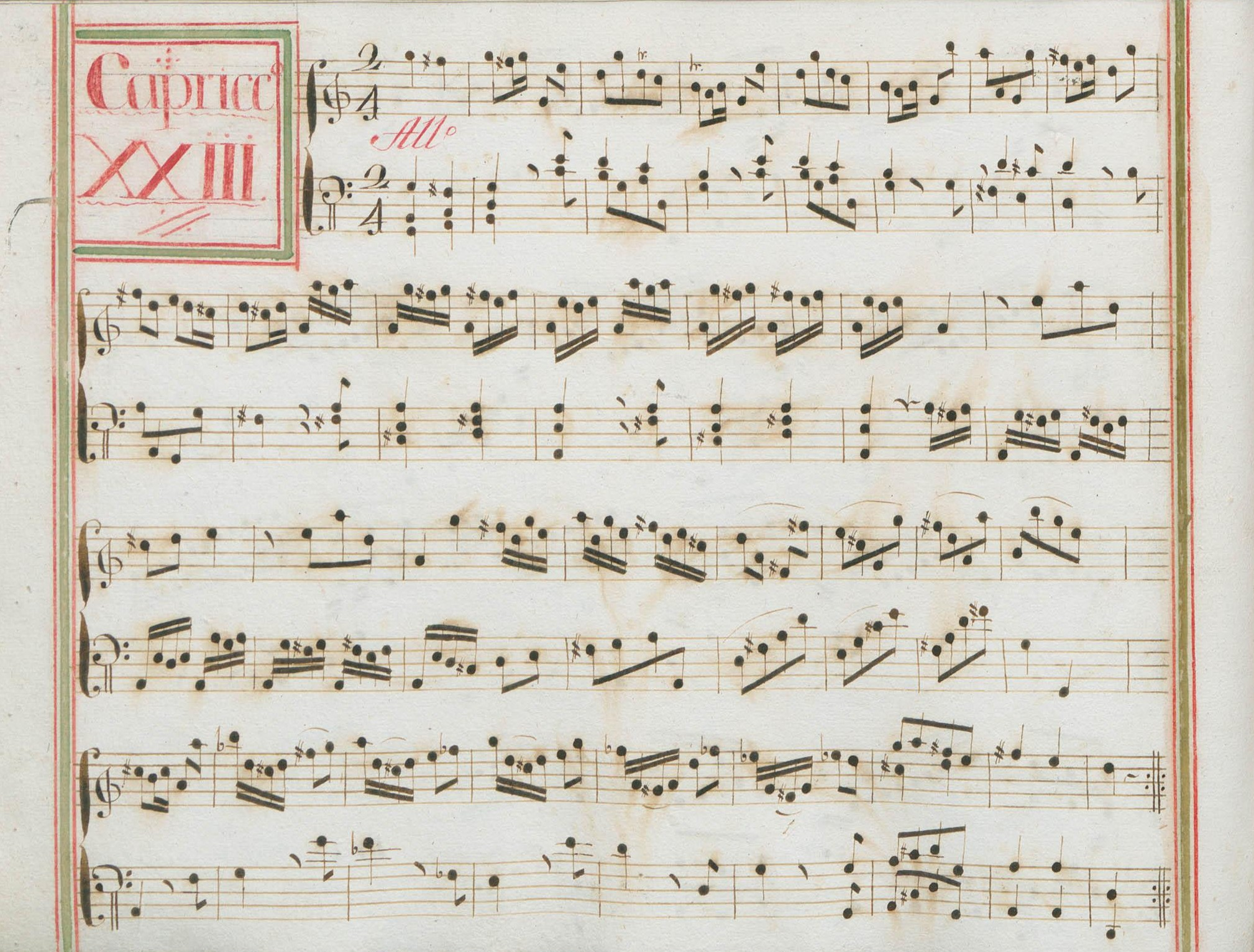 La sonate K. 63, telle qu'elle se présente dans le manuscrit de Venise, volume XIV no. 23.